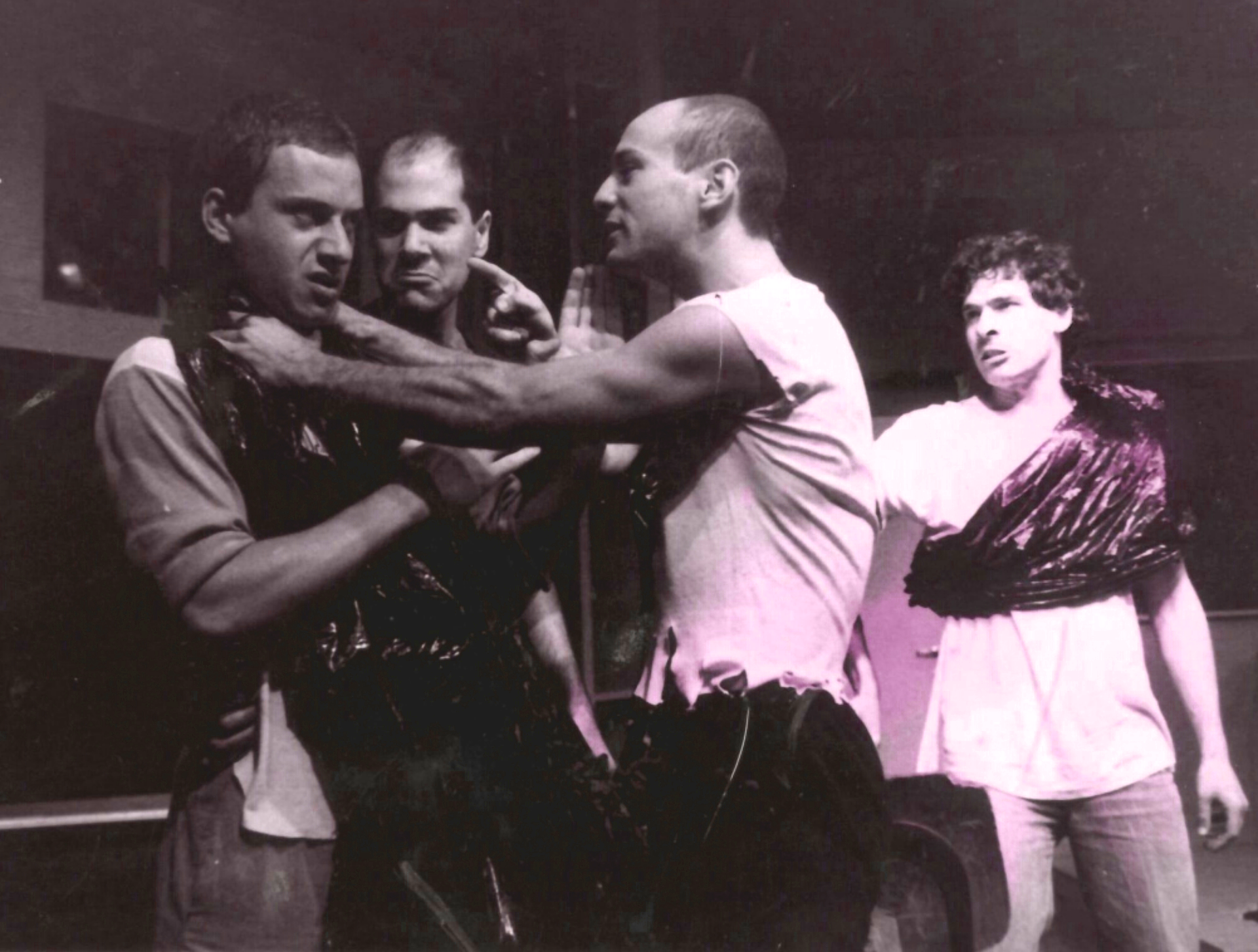 שוליים קשים